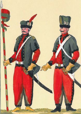 21. Towarzysz i pocztowy 2 Pułku Straży Przedniej (Miączyńskiego) [Towarzysz i pocztowy pułku przedniej staży Kajetana Miączyńskiego (późniejszego 5 pułku przedniej straży)]